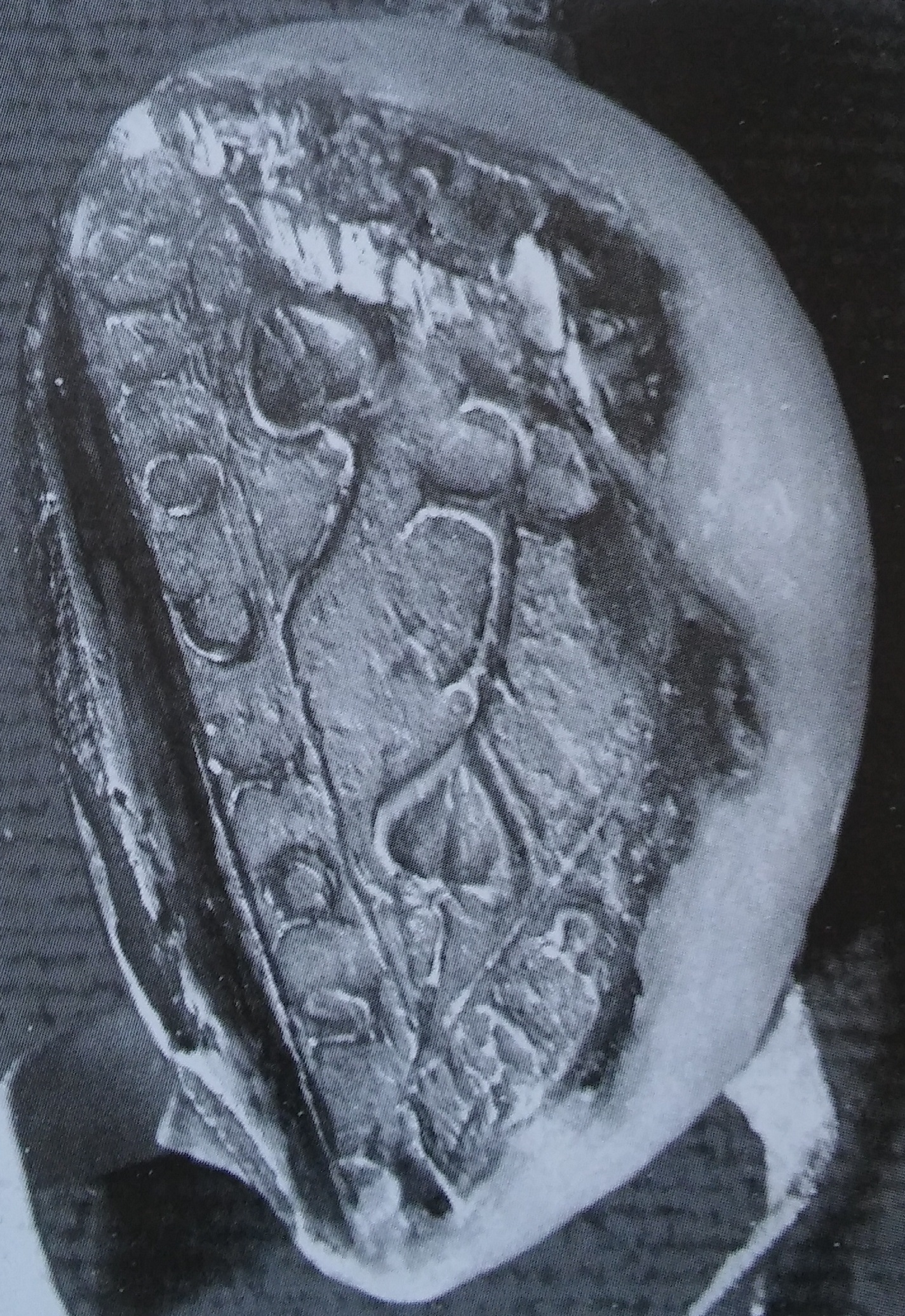 Rátót nb. Rénold veszprémi ispán pecsétjének maradványa, 1237